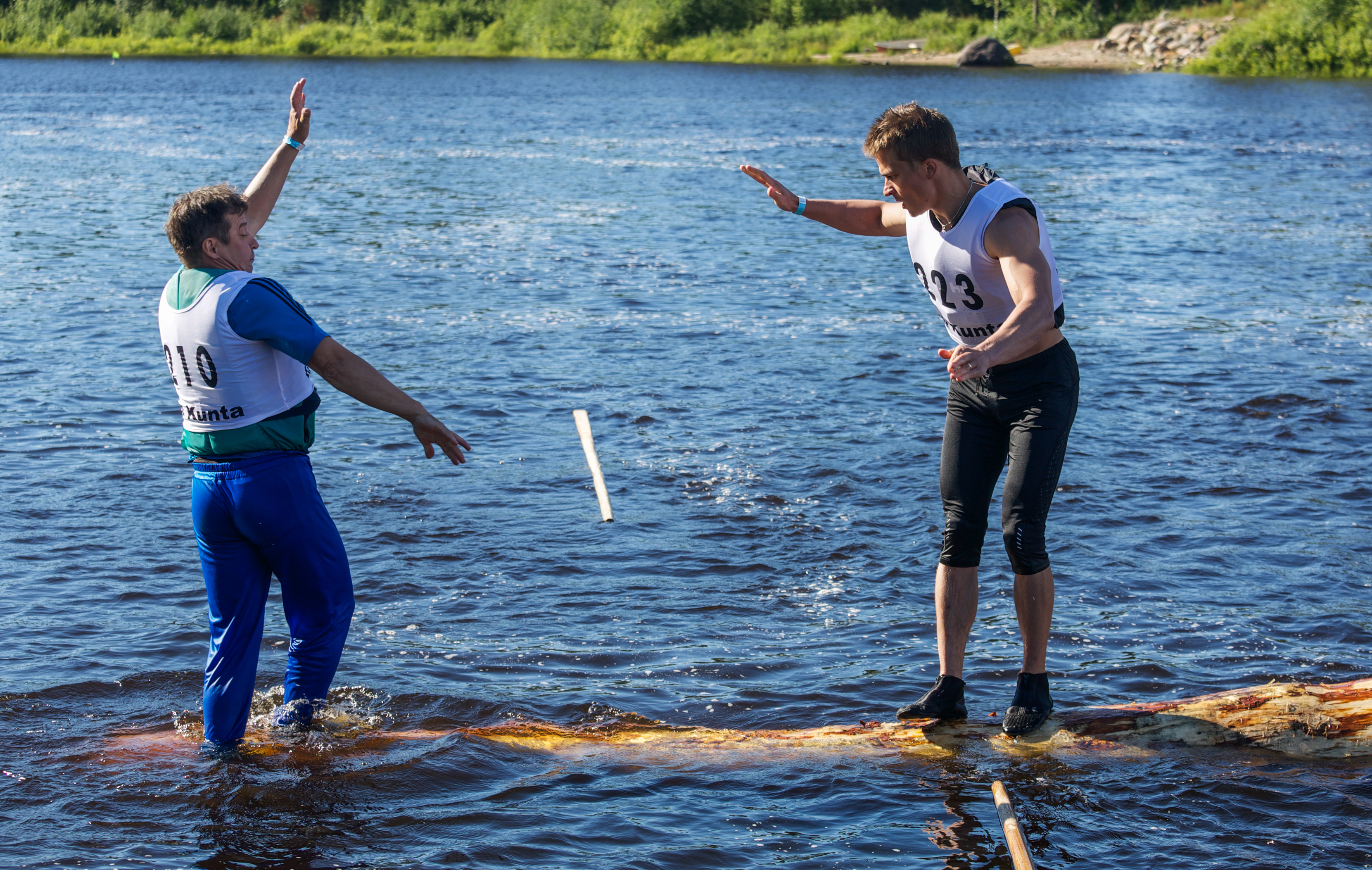 Tukkilaiskisat, rullaus